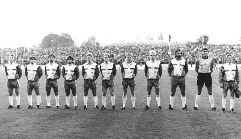 ADN-ZB-Oberst-11.10.89-ma-Karl-Marx-Stadt: Die DDR-Nationalmannschaft im Fußball vor dem siegreichen Weltmeisterschafts-Qualifikationsspiel (2:1) gegen die UdSSR am 8.10.1989 in Karl-Marx-Stadt, im Karl-Marx-Städter Sportforum. Von rechts nach links: Mannschaftskapitän Roland Kreer (1. FC Lok Leipzig), Torwart Dirk Heyne, Dirk Stahmann (beide 1. FC Magdeburg), Rainer Ernst (BFC Dynamo), Matthias Lindner (1. FC Lok Leipzig), Matthias Sammer, Matthias Döschner, Ulf Kirsten (alle SG Dynamo DResden), Rico Steinmann (FC Karl-Marx-Stadt), Jörg Stübner (SG Dynamo Dresden) und Andreas Thom (BFC Dynamo).